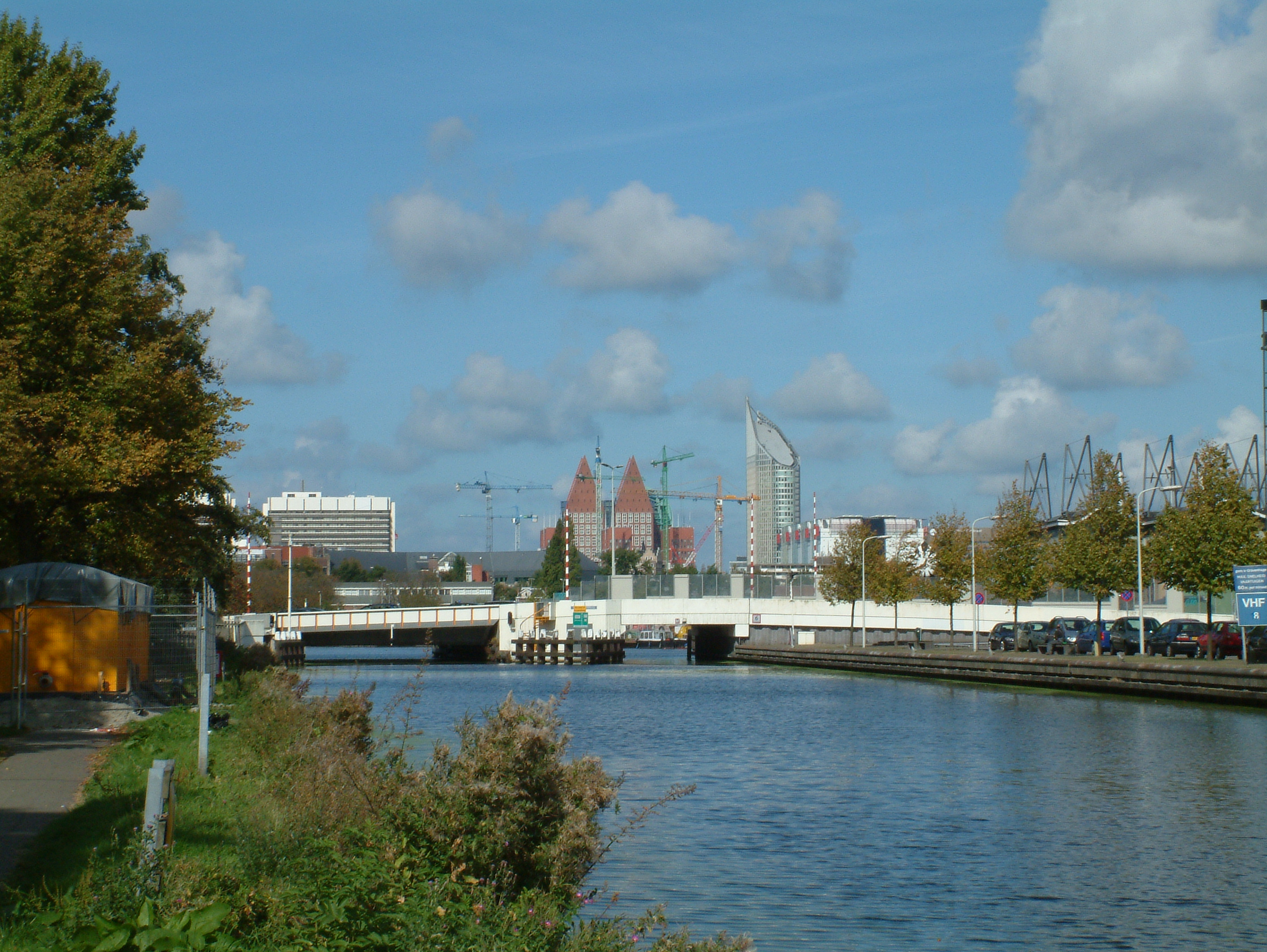 Brug in Den Haag